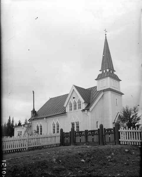 Kyrkan från sydväst.